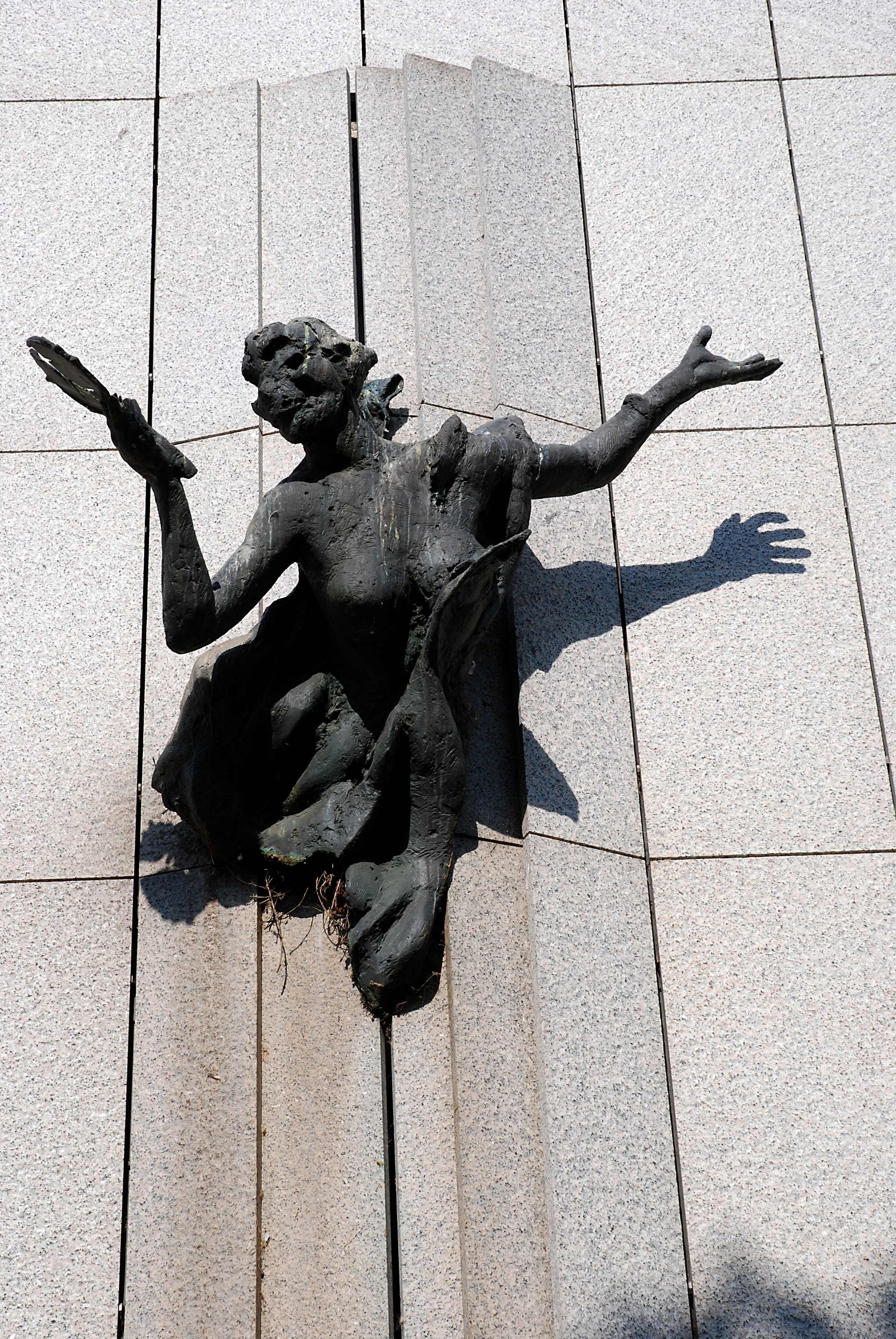 Dortmund, Stadttheater, Schauspielhaus, Skulptur an der Südfassade